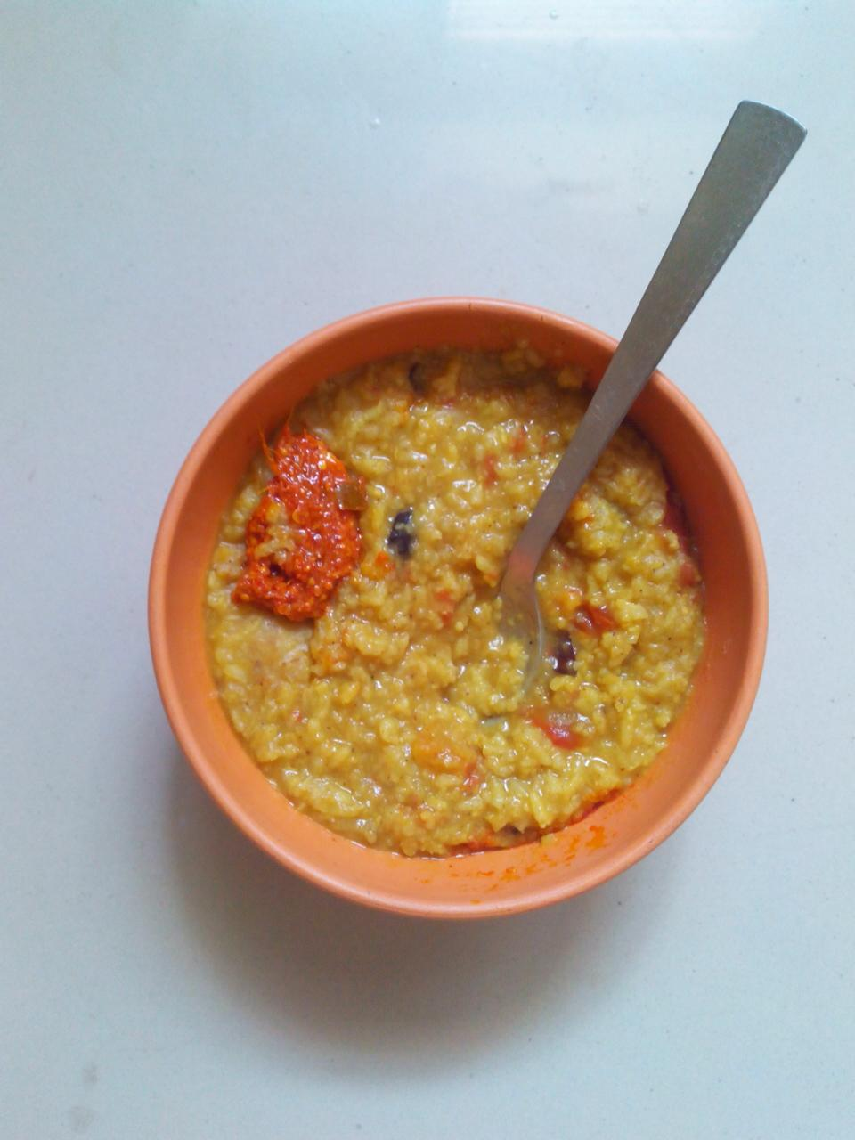 Dal Khichdi